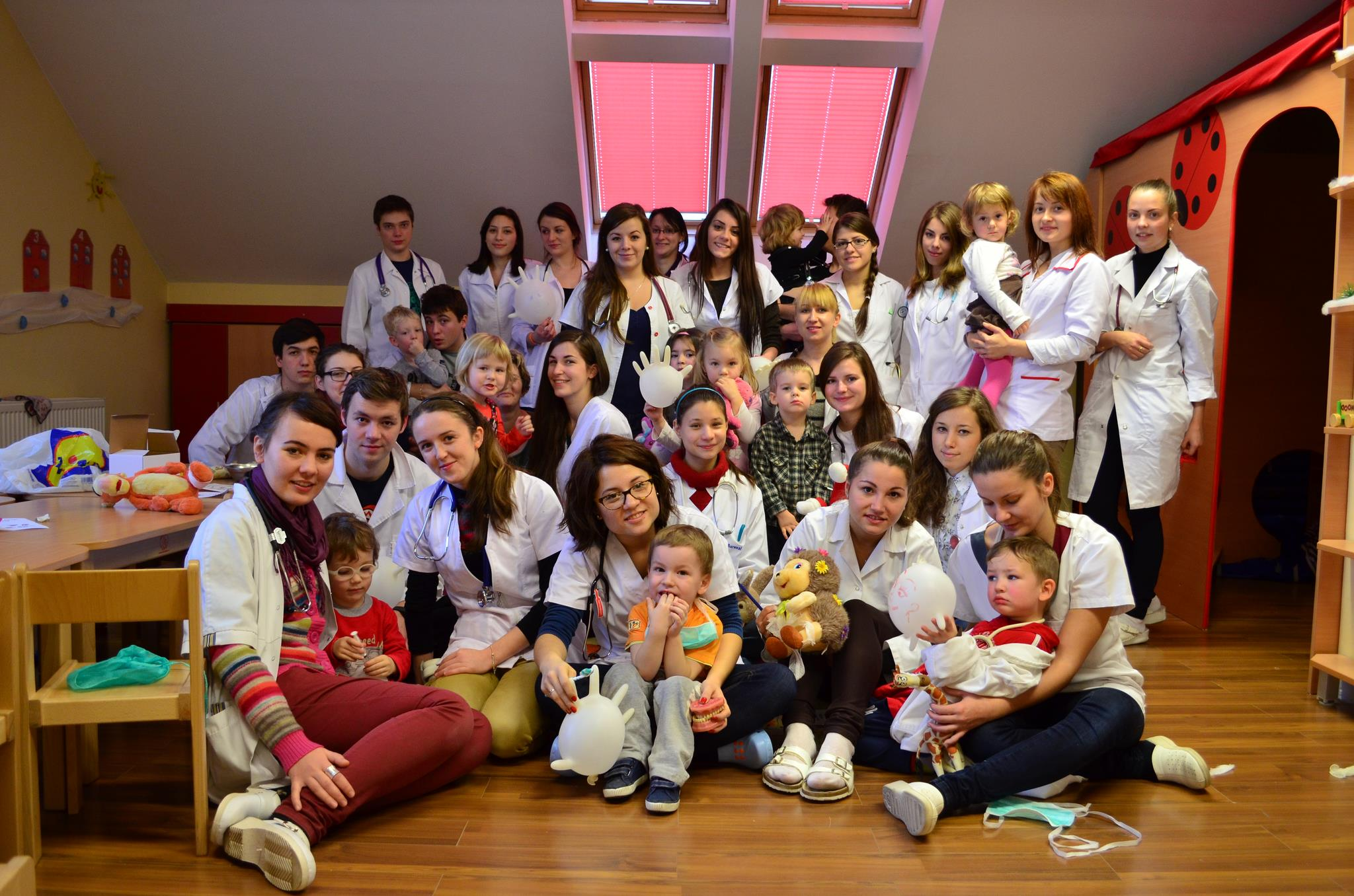 A Marosvásárhelyi Magyar Diákszövetség (MMDSZ) szervezésében sorkerülő Teddy Maci Akció, 2013.